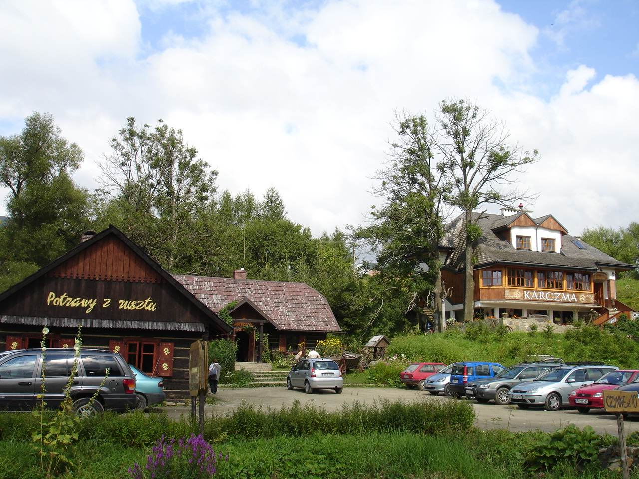 village Wetlina - bars